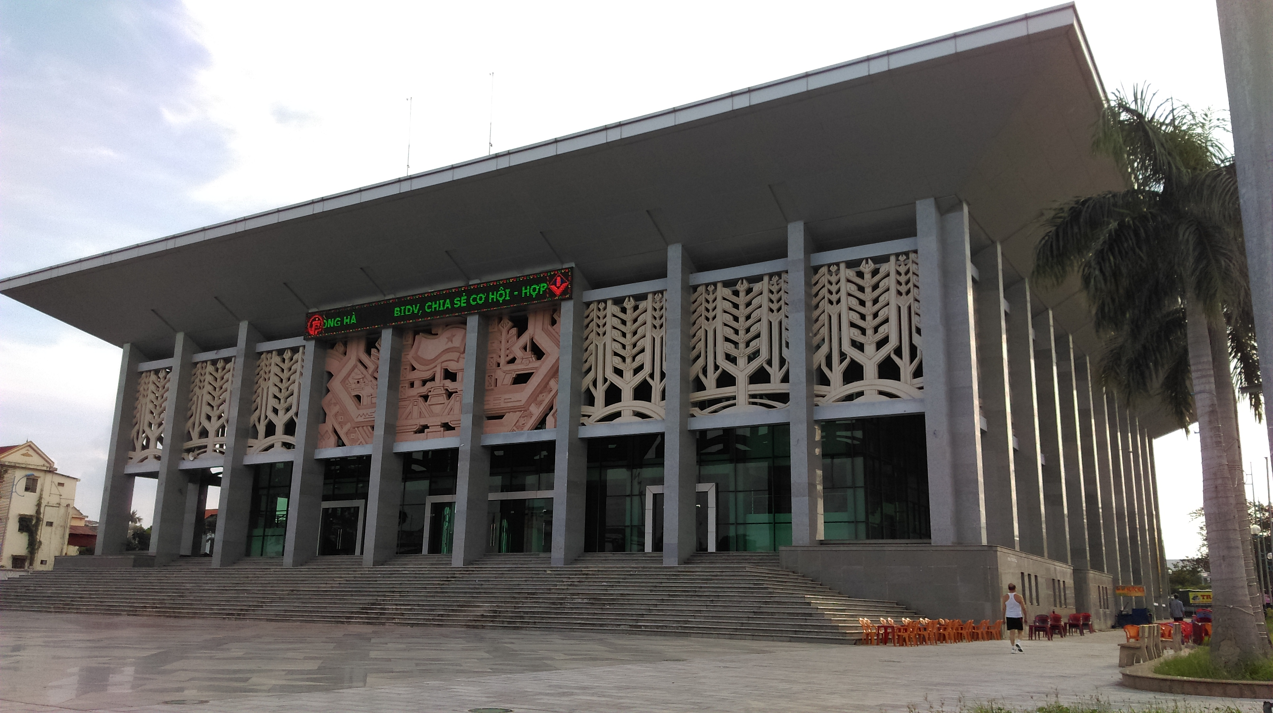 Trung tâm Văn hóa tỉnh Quảng Trị